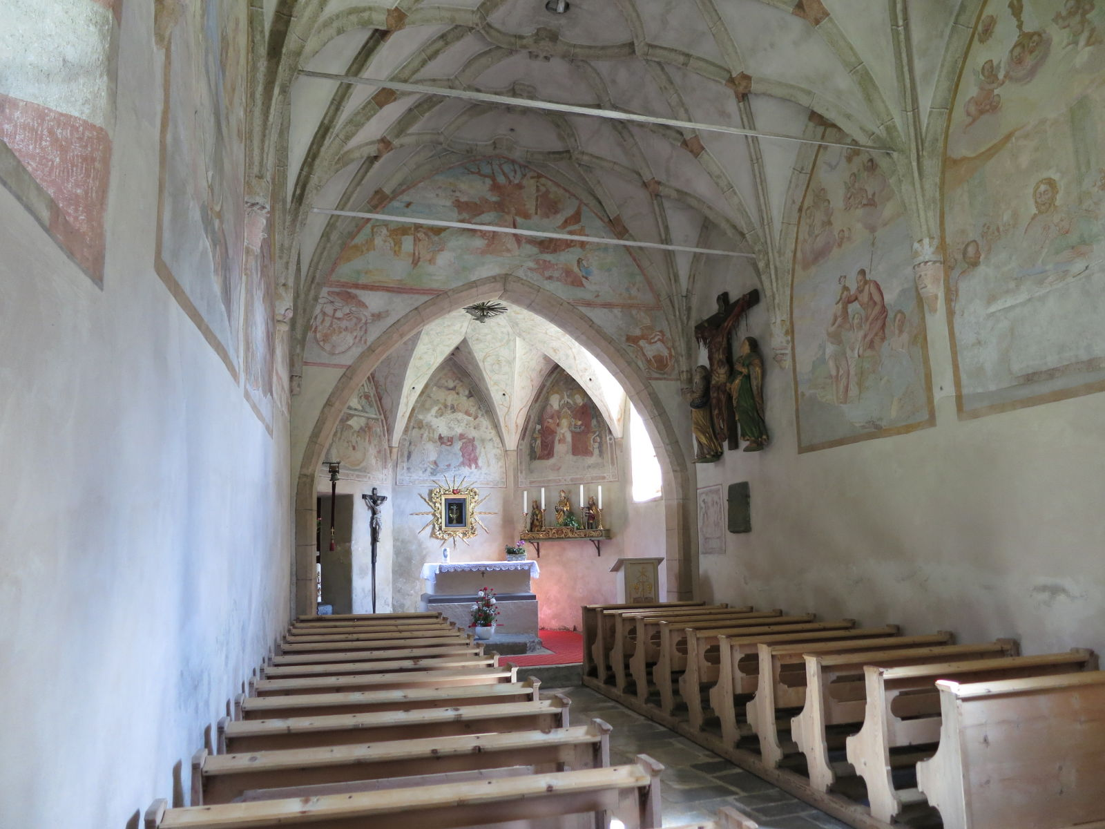 Chapelle du Saint-Esprit, Kasern, Prettau, Trentin-Haut-Adige, Italie